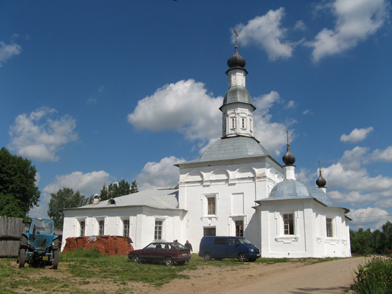 Kolocky_Monastery near Mozhajsk. Uspensky Sobor (Успенский собор Колоцкого монастыря).